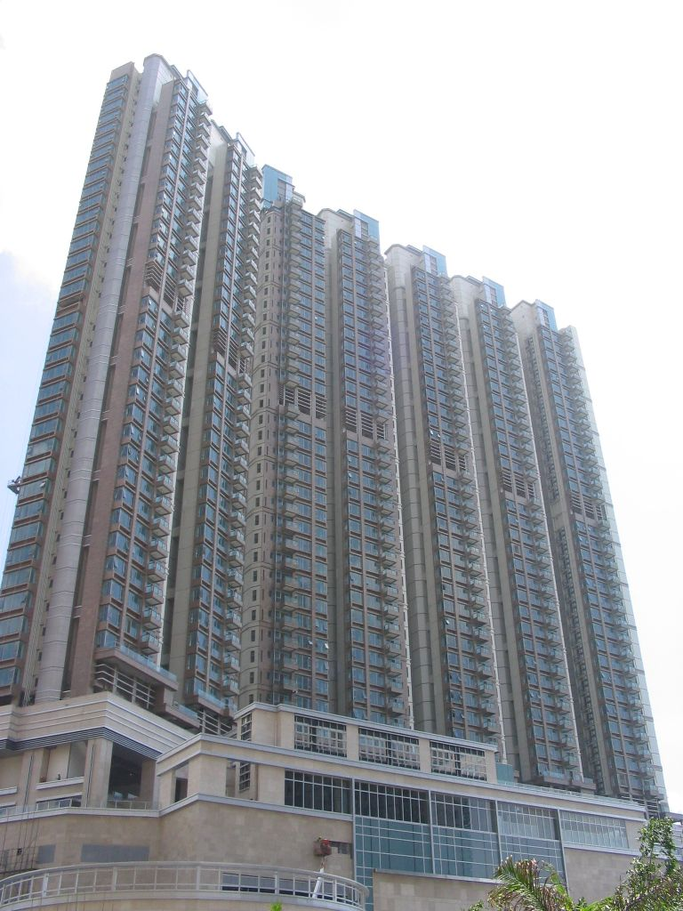 一號銀海 One Silver Sea